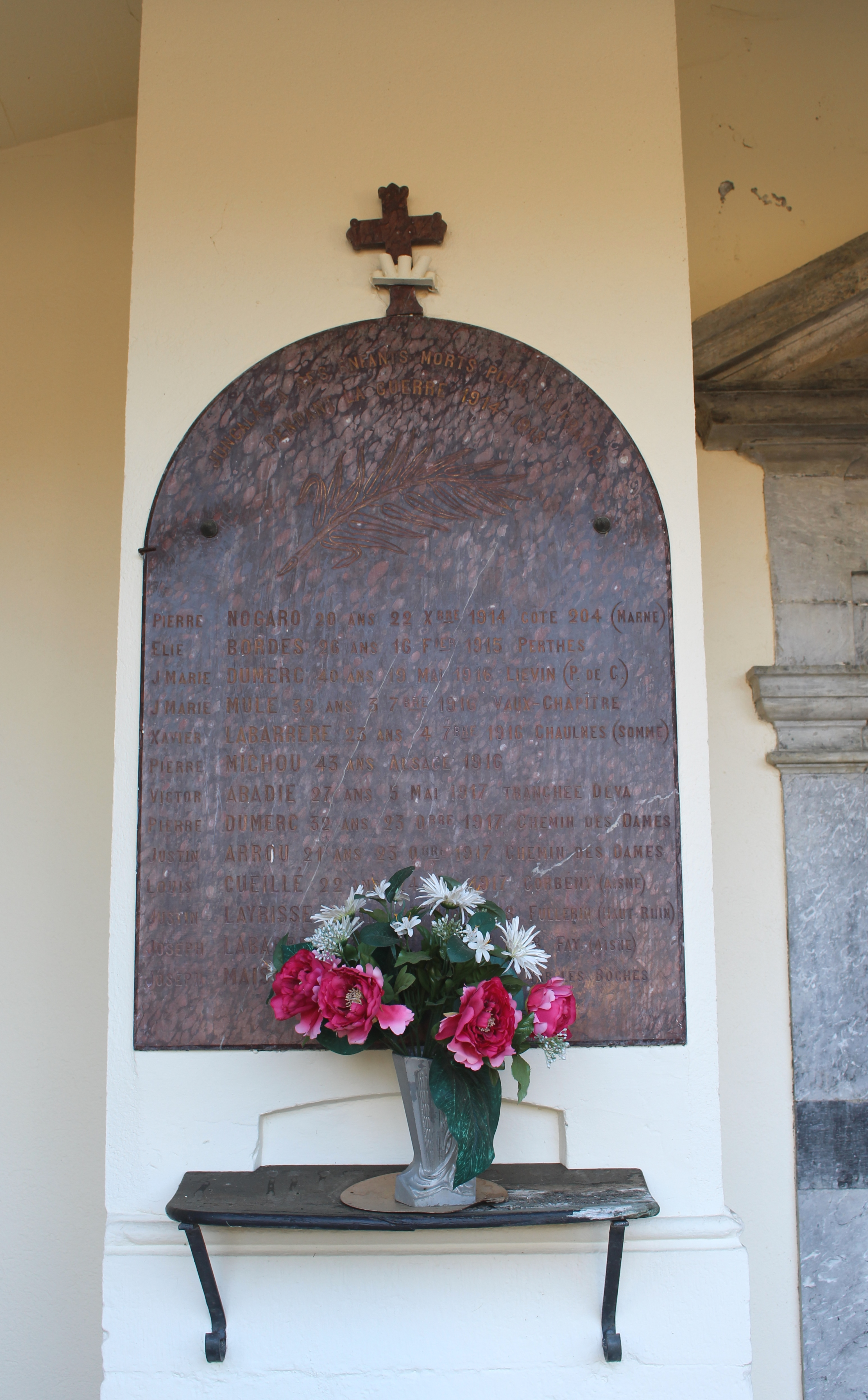 Monument aux morts de Juncalas (Hautes-Pyrénées)